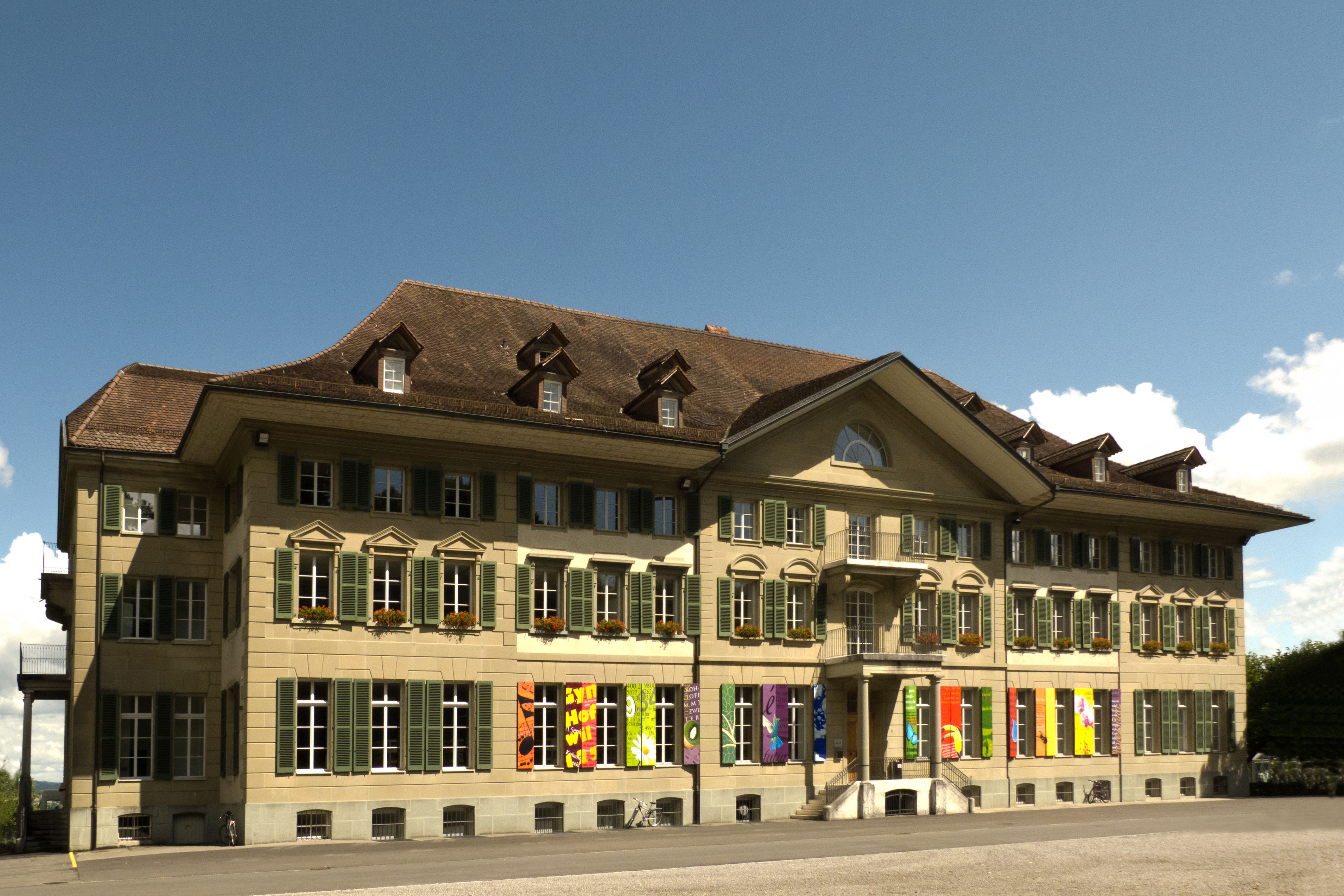 Institutsgebäude Hofwil, Hofseite.